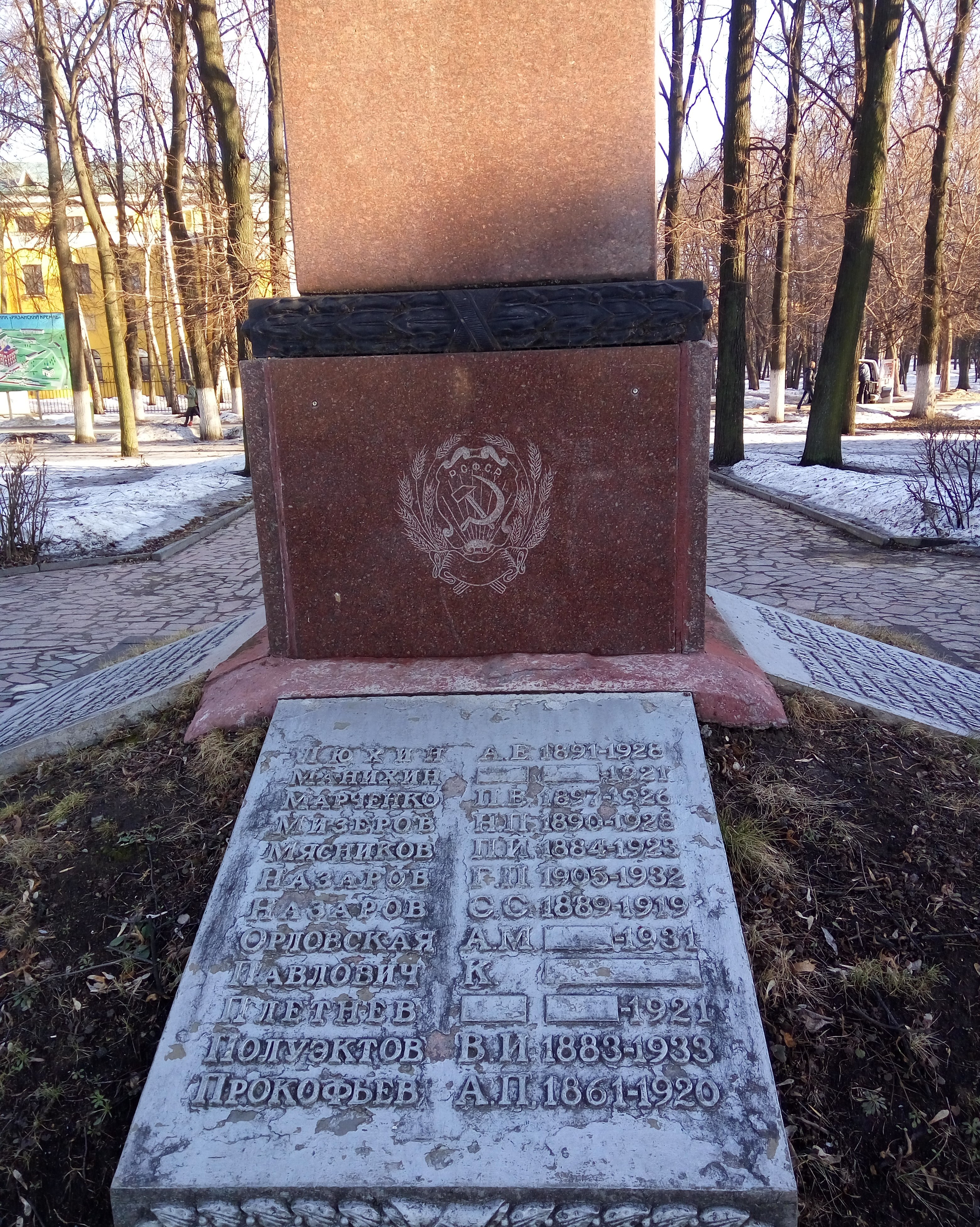 Стела героям гражданской войны 1917-1918 годов (Рязань), вид спереди